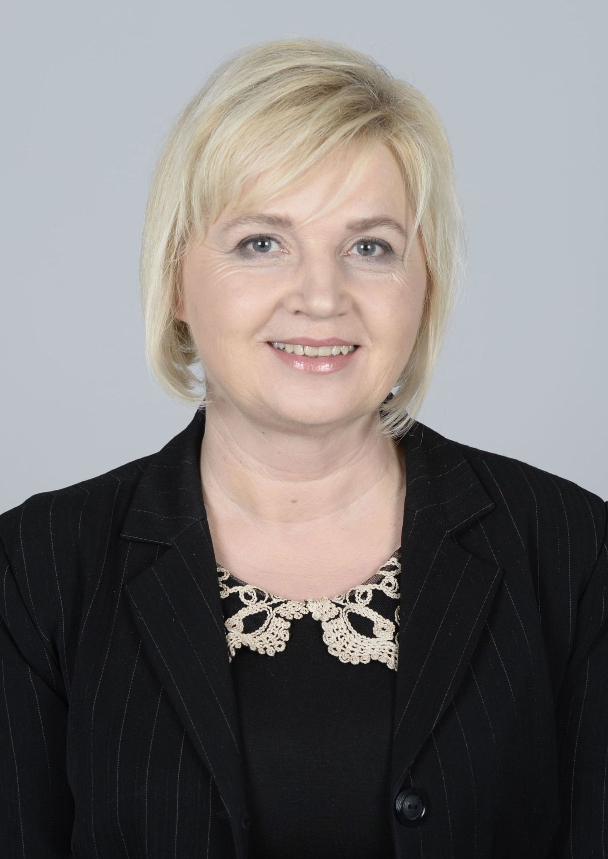 Senator Lidia Staroń